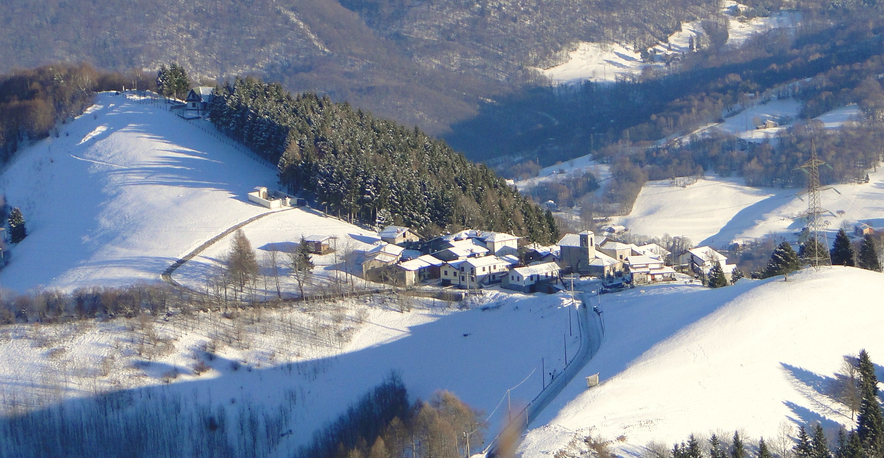 Vista di Ganda, fraz. di Aviatico (BG), dal monte Cornagera